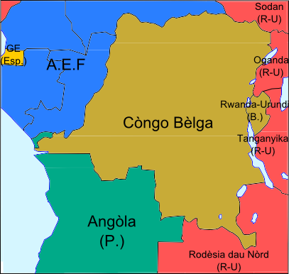 Còngo Bèlga après lo partiment de l'Africa Orientala Alemanda.